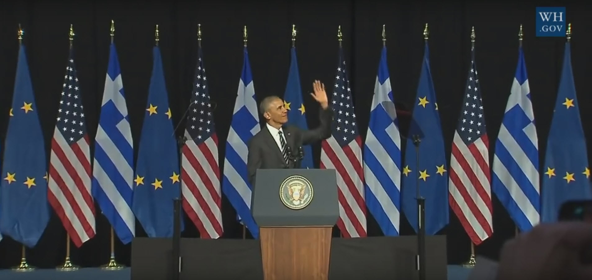 Ο Πρόεδρος των Ηνωμένων Πολιτειών της Αμερικής, Μπάρακ Ομπάμα, κατά την ομιλία του στο Κέντρο Πολιτισμού Ίδρυμα Σταύρος Νιάρχος στη Αθήνα, στις 16 Νοεμβρίου 2016